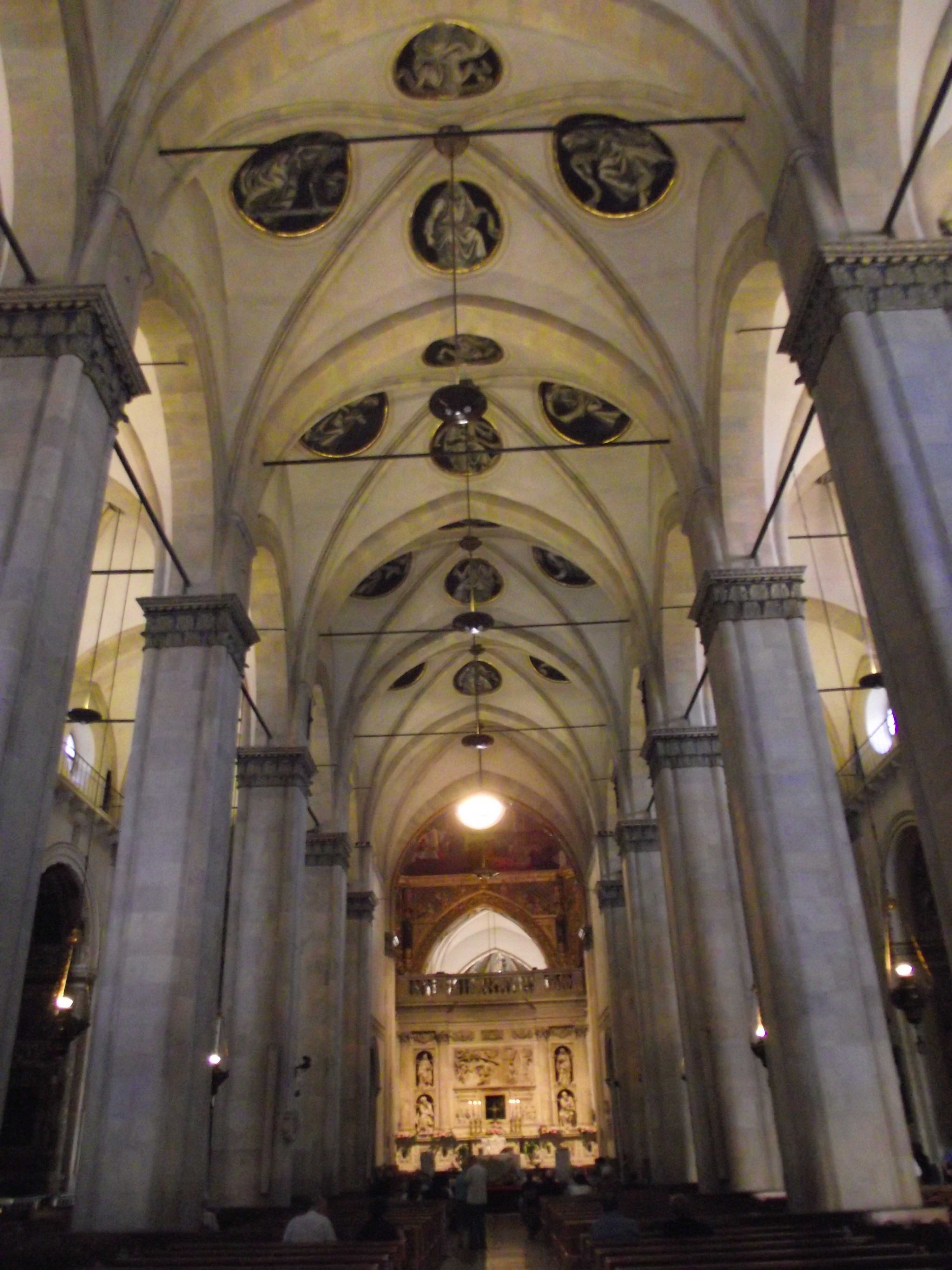 Loreto, Basilica della Santa Casa